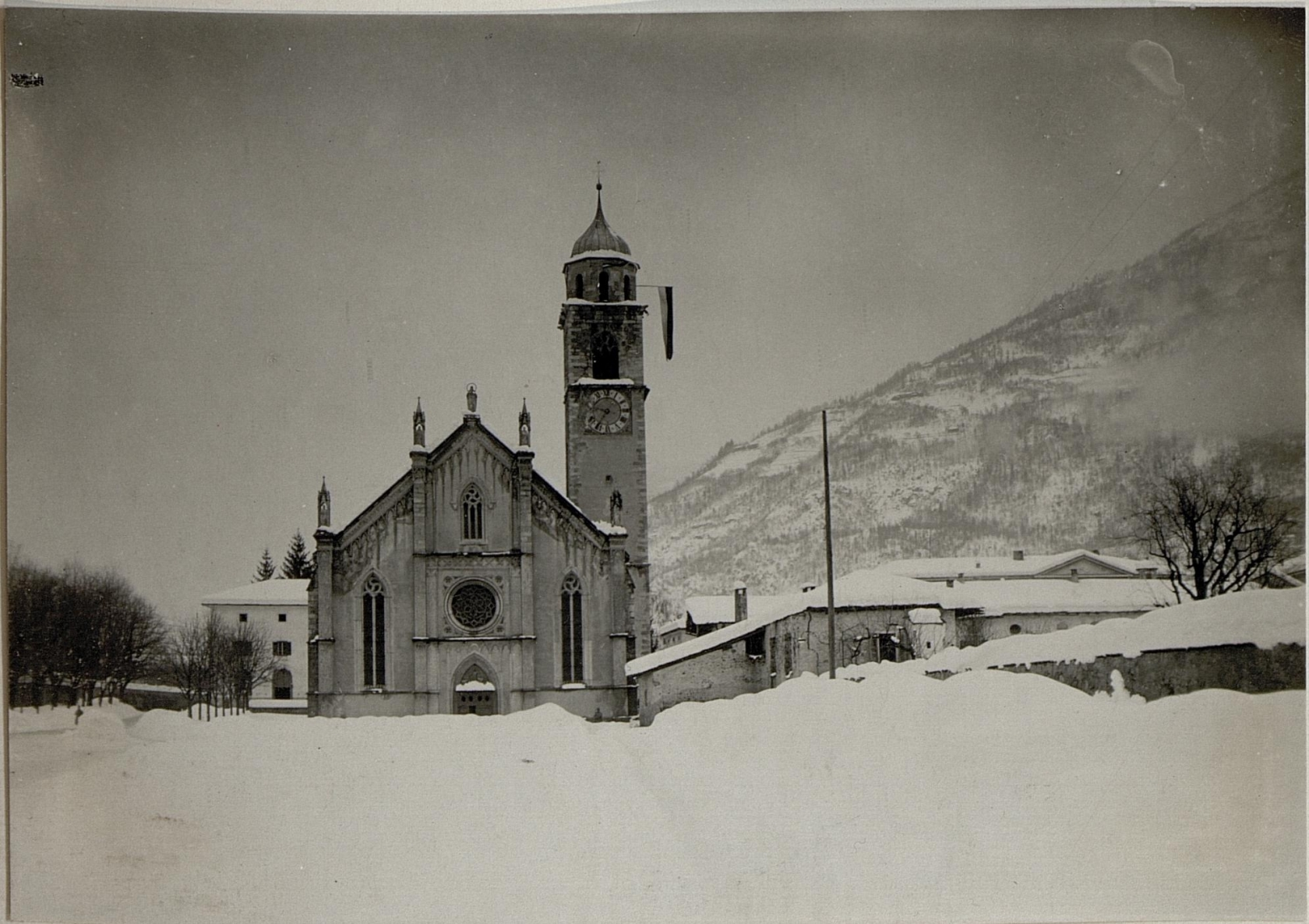 Im Jänner 1917 besuchte Kaiser Karl die Front in Südtirol